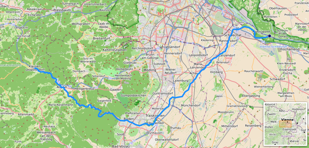 carte réalisée sur umap.openstreetmap, This map may be incomplete, and may contain errors. Don't rely solely on it for navigation.